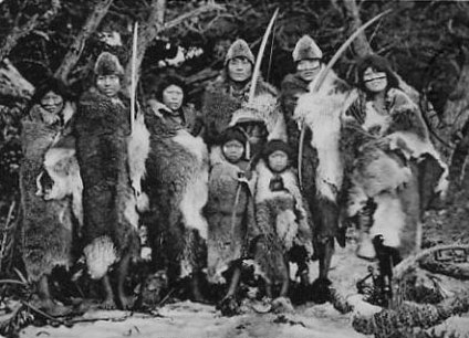 Realizaban su propia vestimenta con pieles y cueros de animales, especialmente Guanacos.